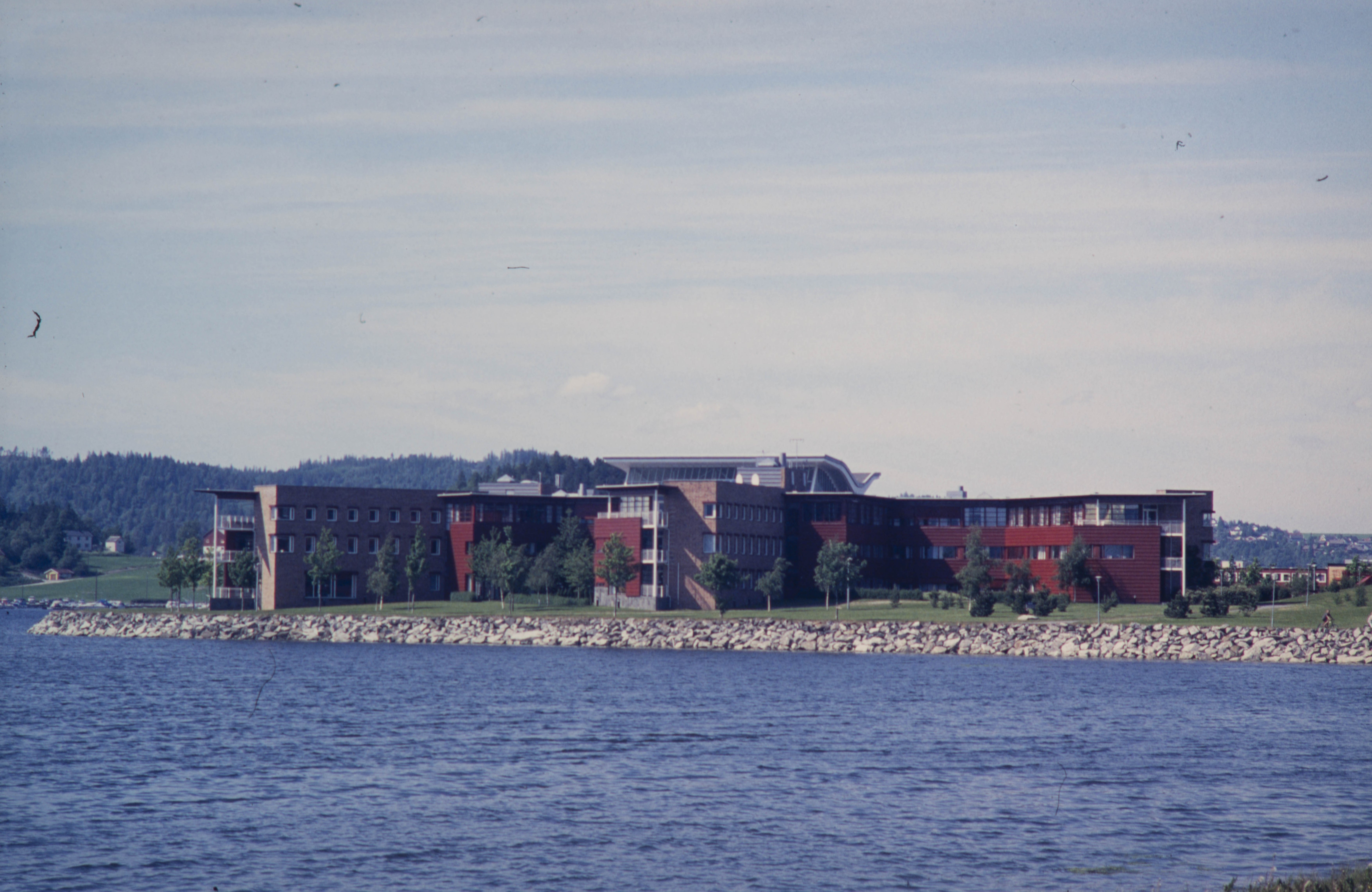 Statoils driftsadministrasjon i Stjørdal.